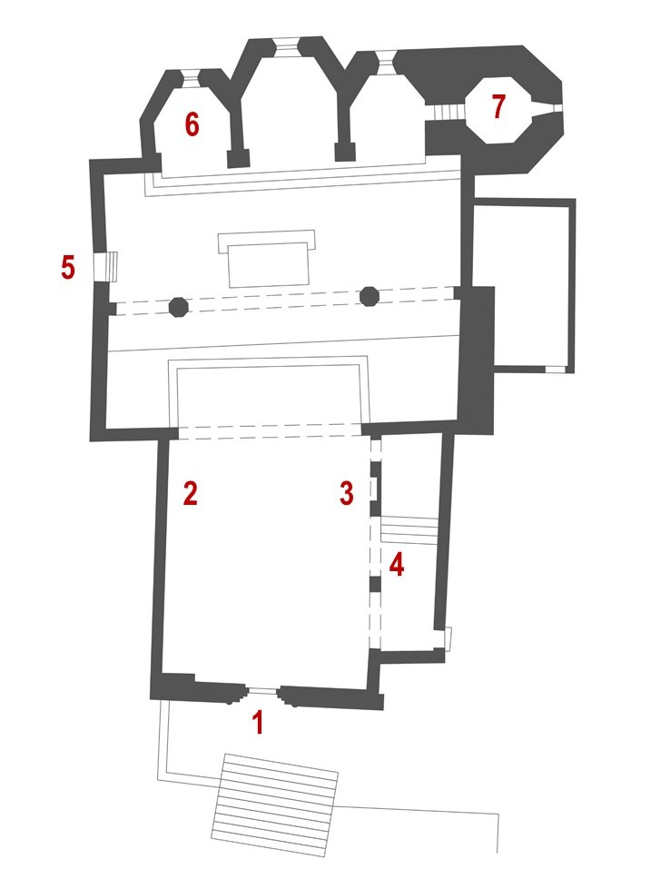 Mappa della chiesa di San Pietro a Coppito con indicazione numerata dei principali monumenti.